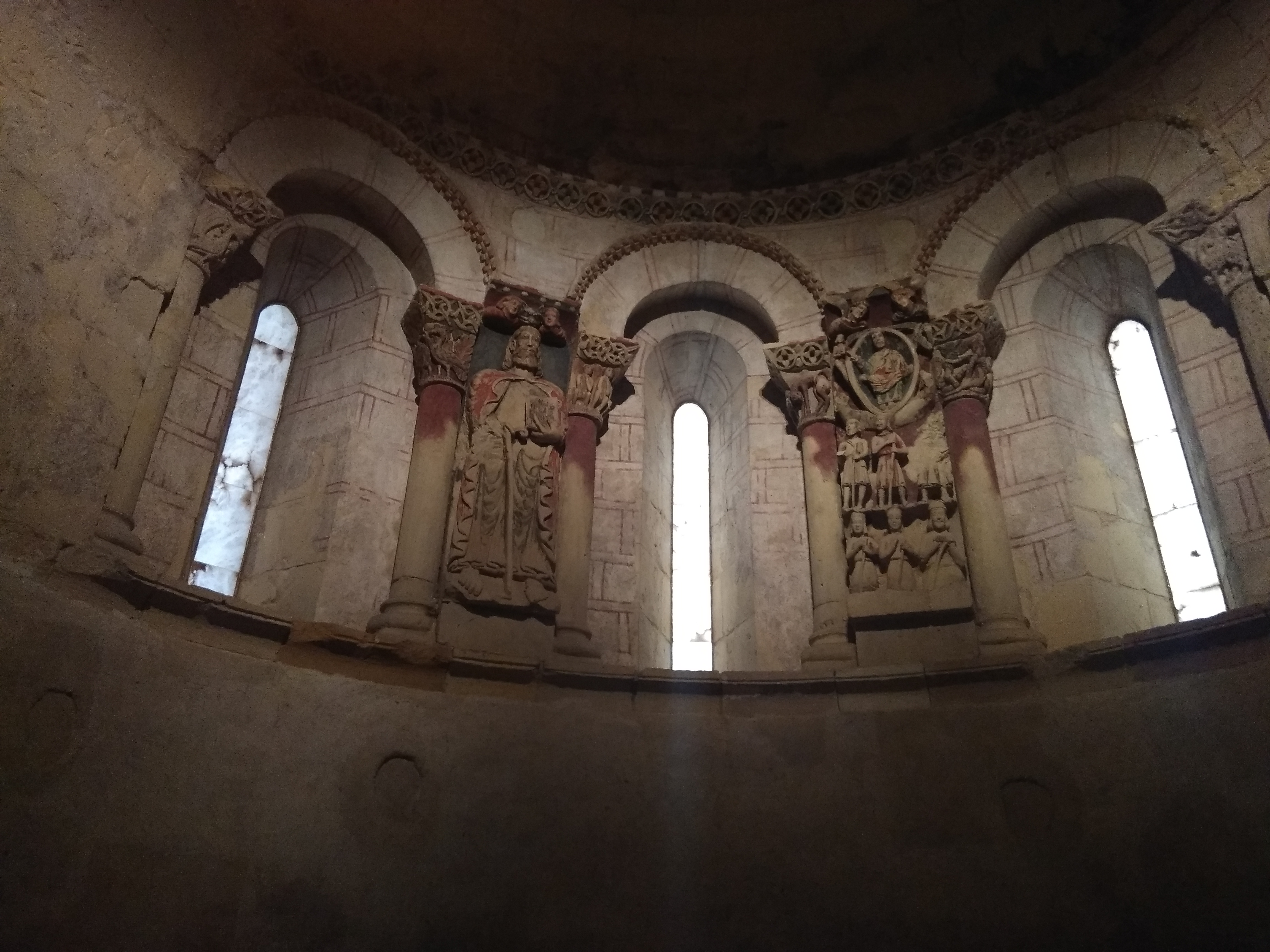 Turégano, Iglesia de Santiago, relieves románicos